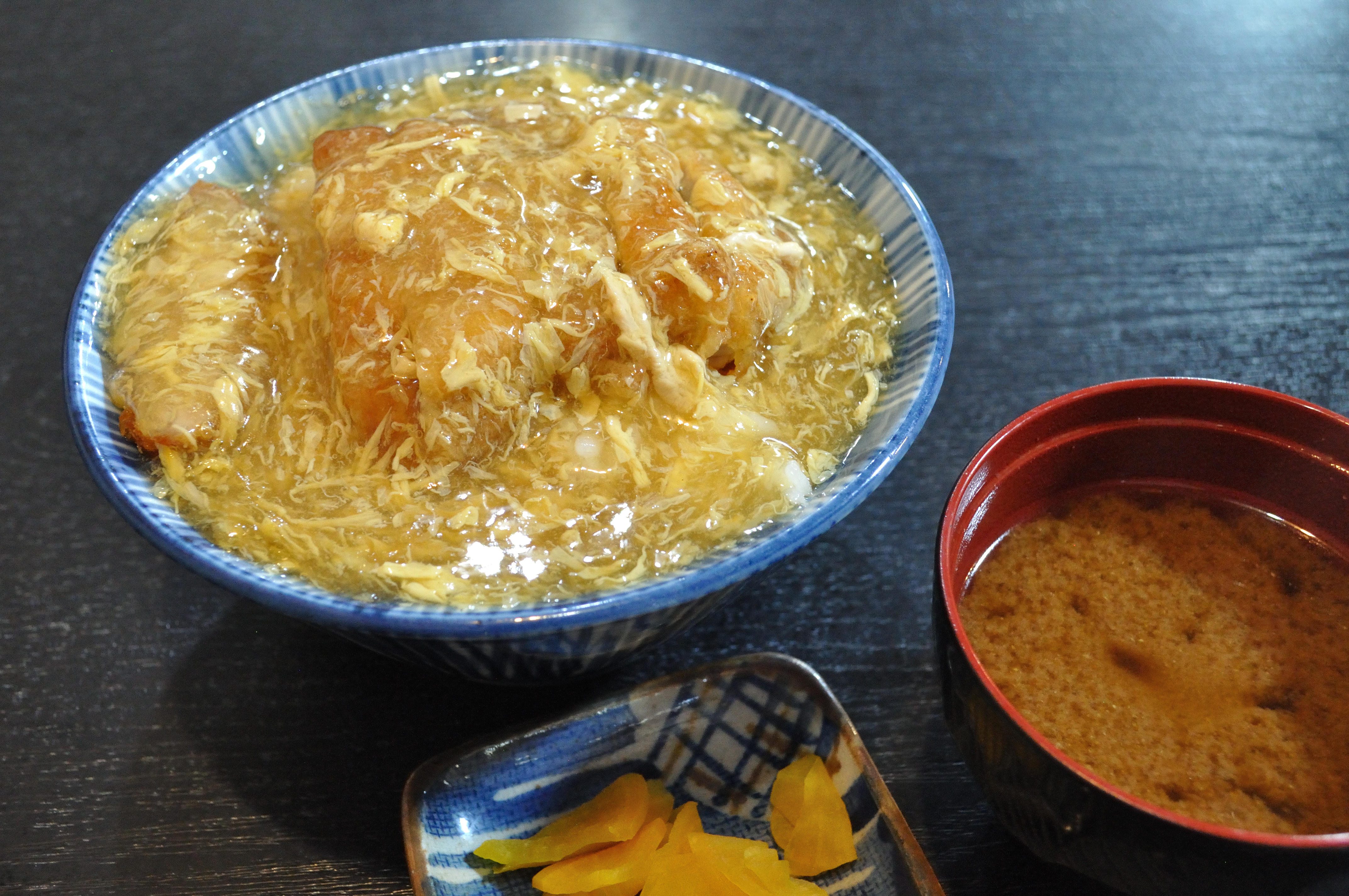 岐阜県瑞浪市にある「加登屋食堂」のあんかけかつ丼